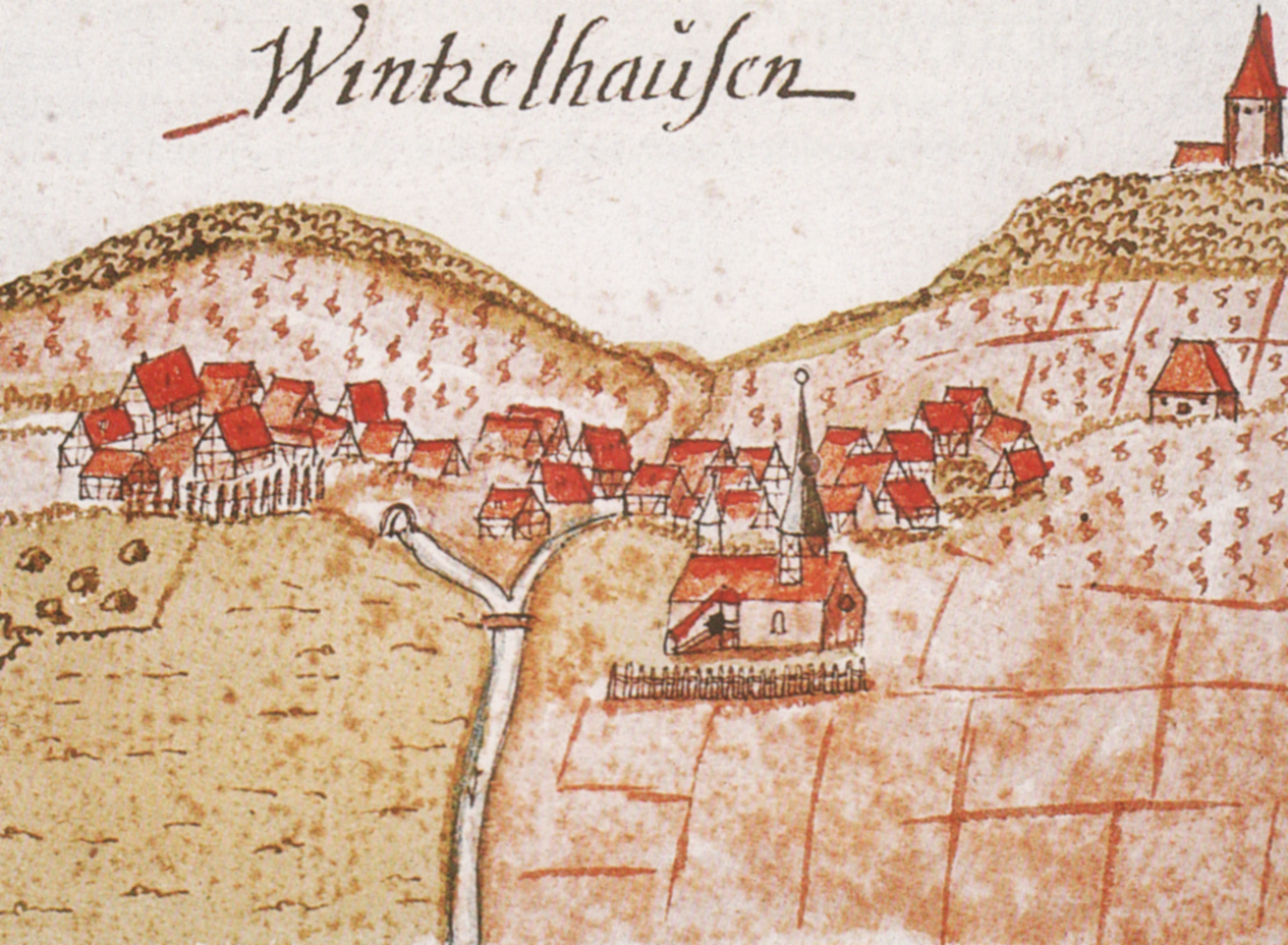 Großbottwar-Winzerhausen in einer Zeichnung von Andreas Kieser ca. 1685